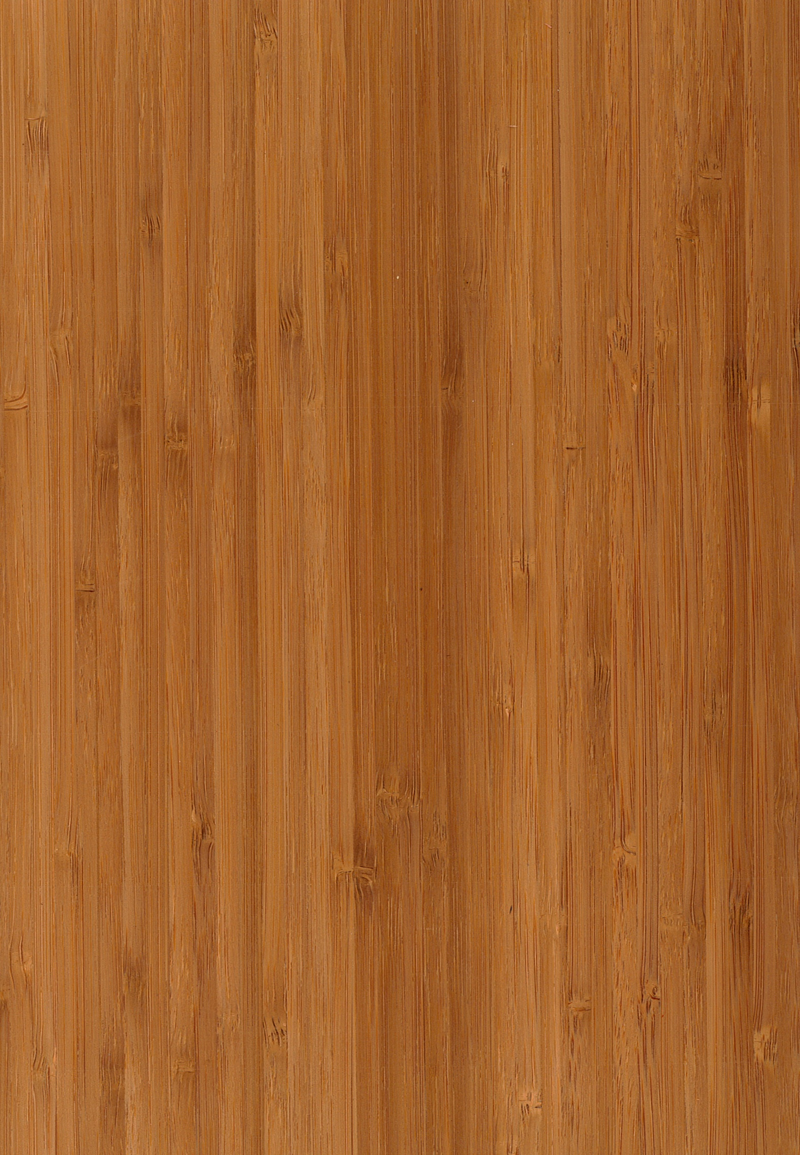 Bambus Furnierholz / Parkett